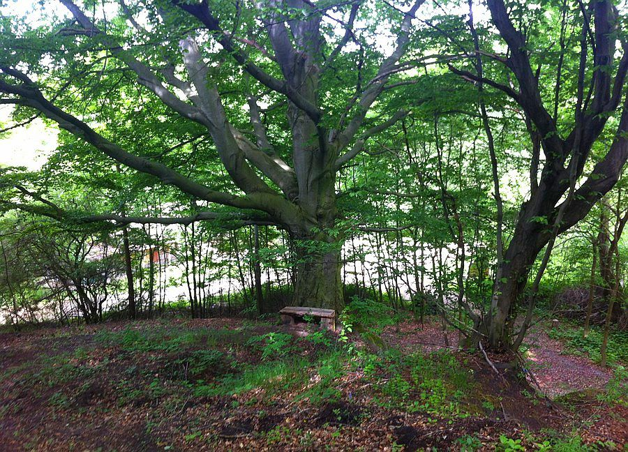 Agostyáni emlékerdő